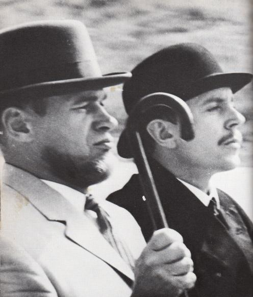 Spede Pasanen ja Jaakko Pakkasvirta vuonna 1964. (X-Paroni)